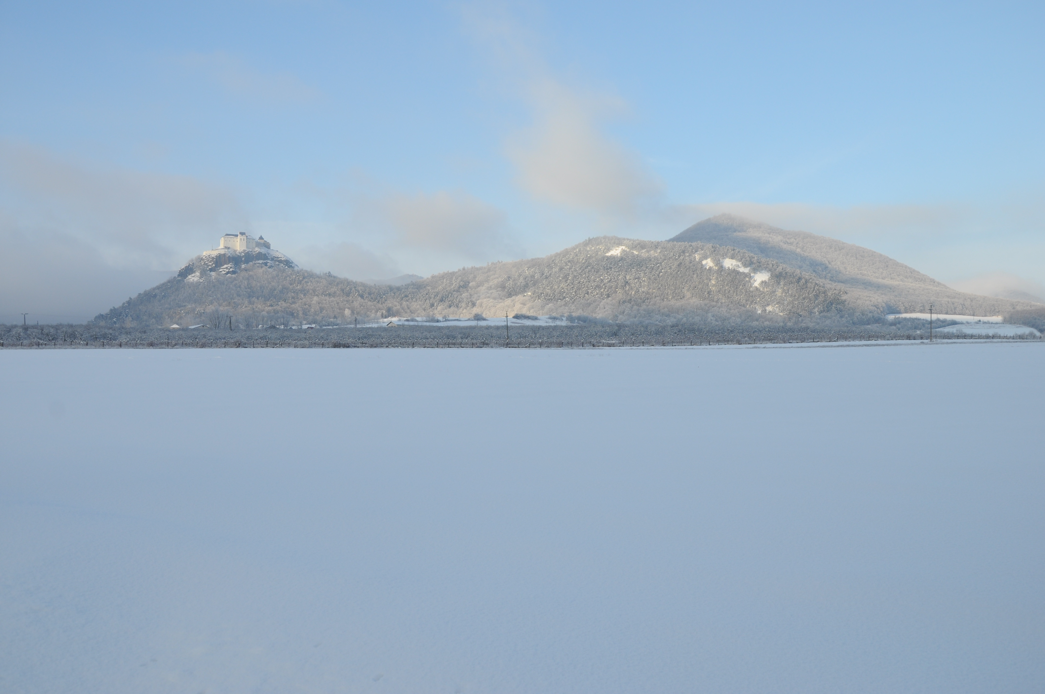 Az újjáépült Füzér vára dél felől